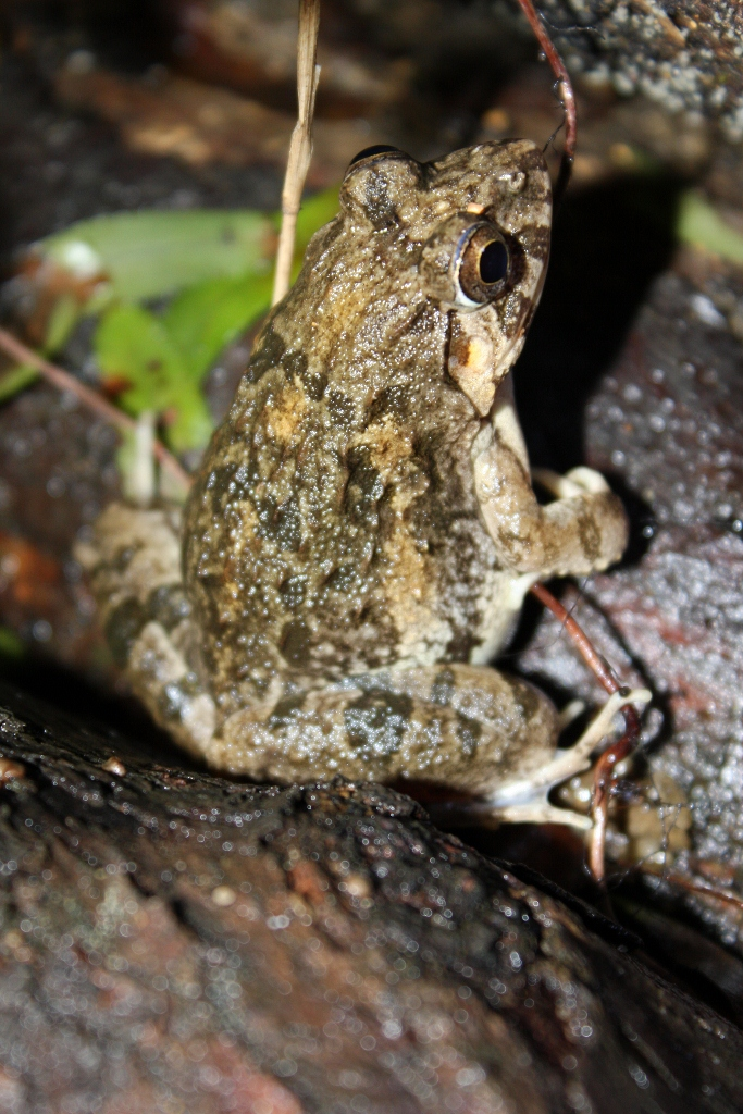 Taken in Tai Po Kau.